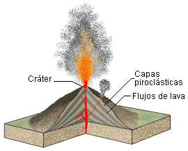 Autor: Usuario:Luis María Benítez